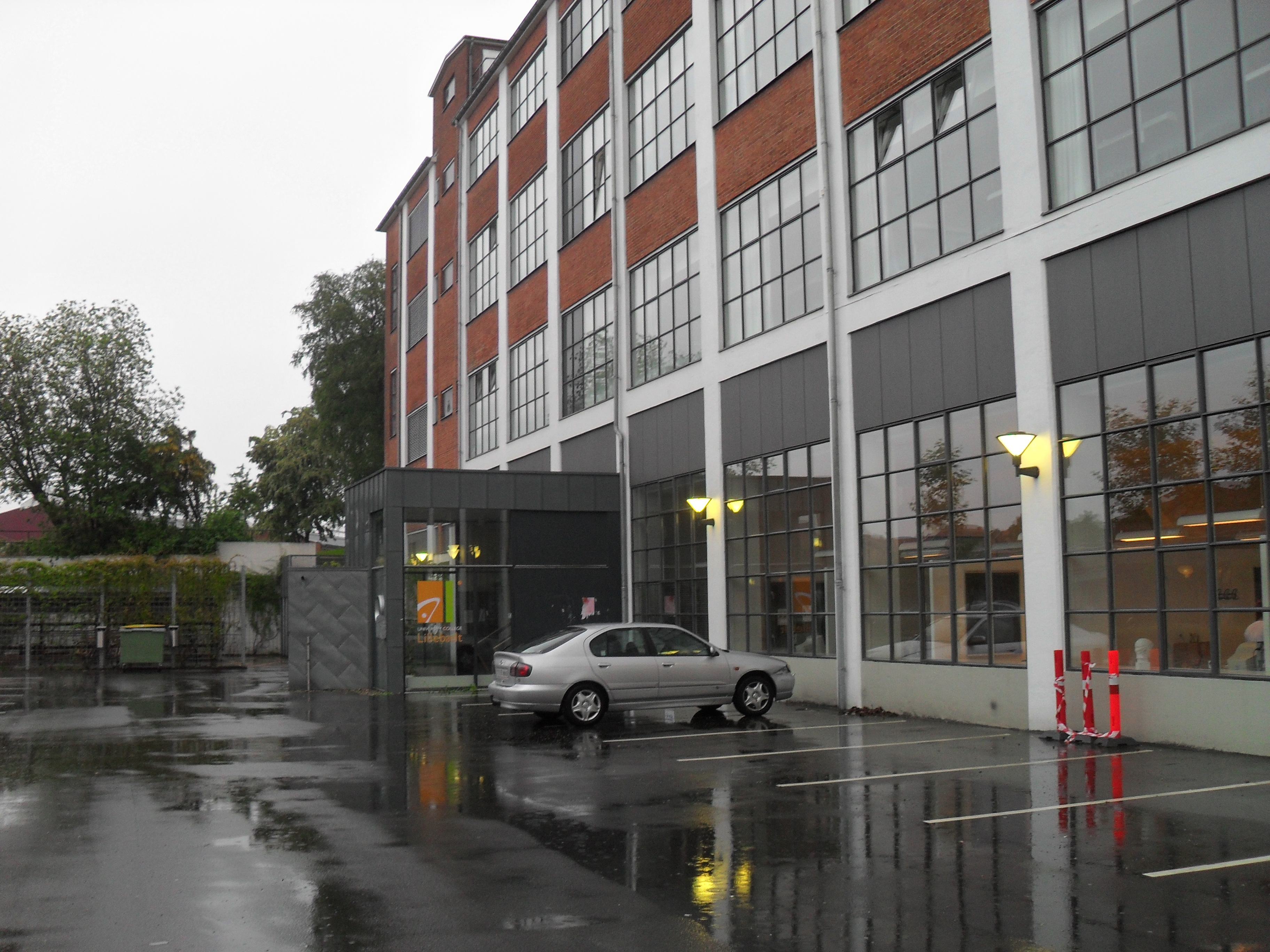 University College Lillebælt